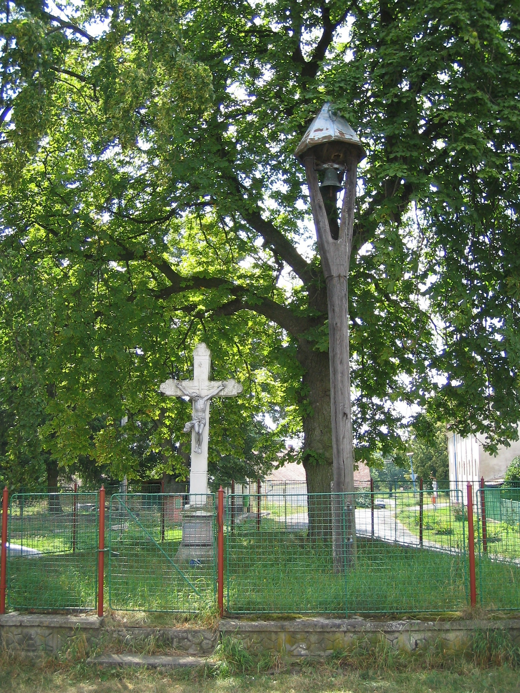 Zvonička ve vesnici Zehuby (Žleby), okres Kutná Hora